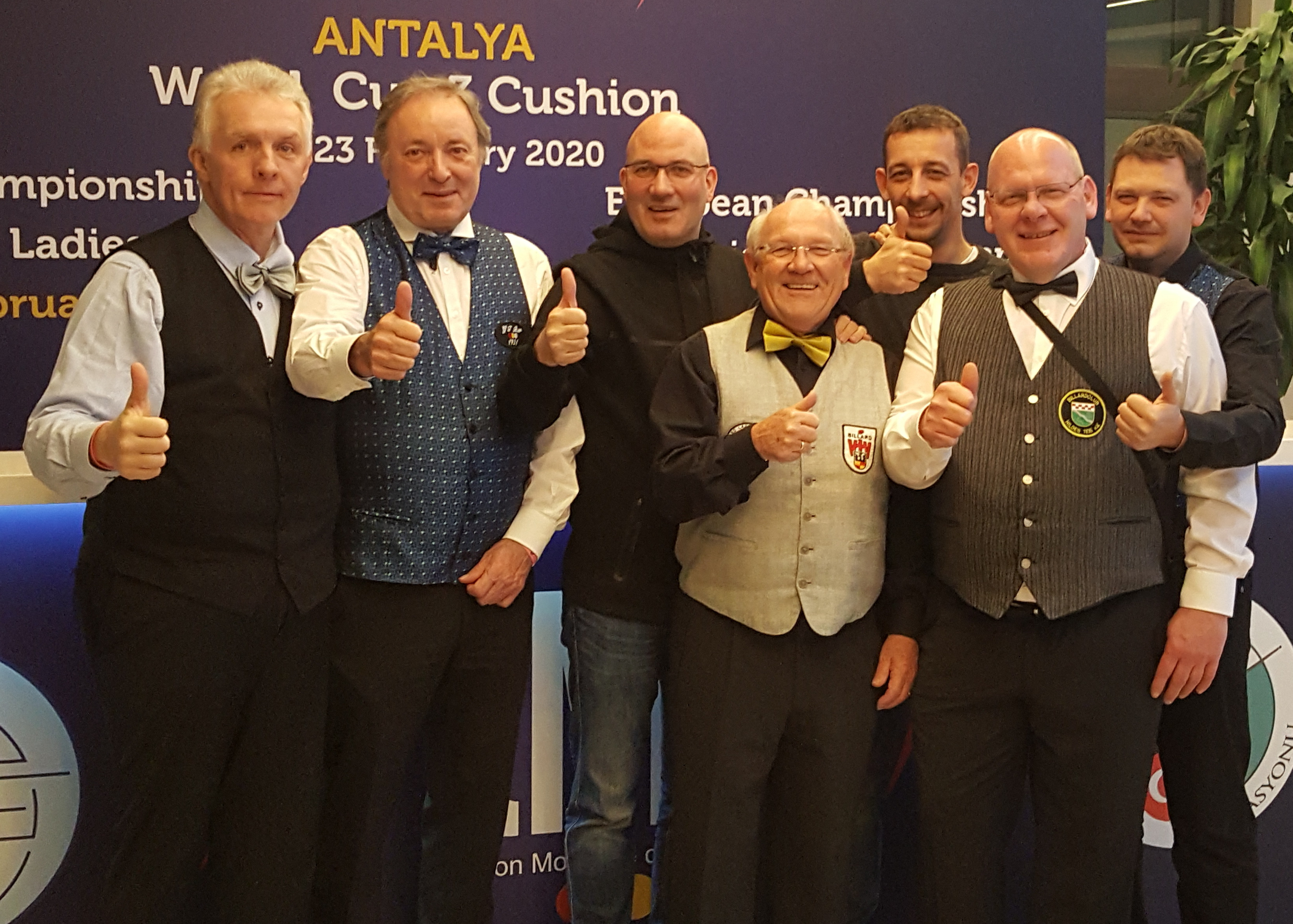 Deutsche Teilnehmer:v.l. Frank Sudar, Dieter Ernst, Martin Horn, Frank Spruzina, Ronny Lindemann, Torsten Rütten und Michael Skibbe